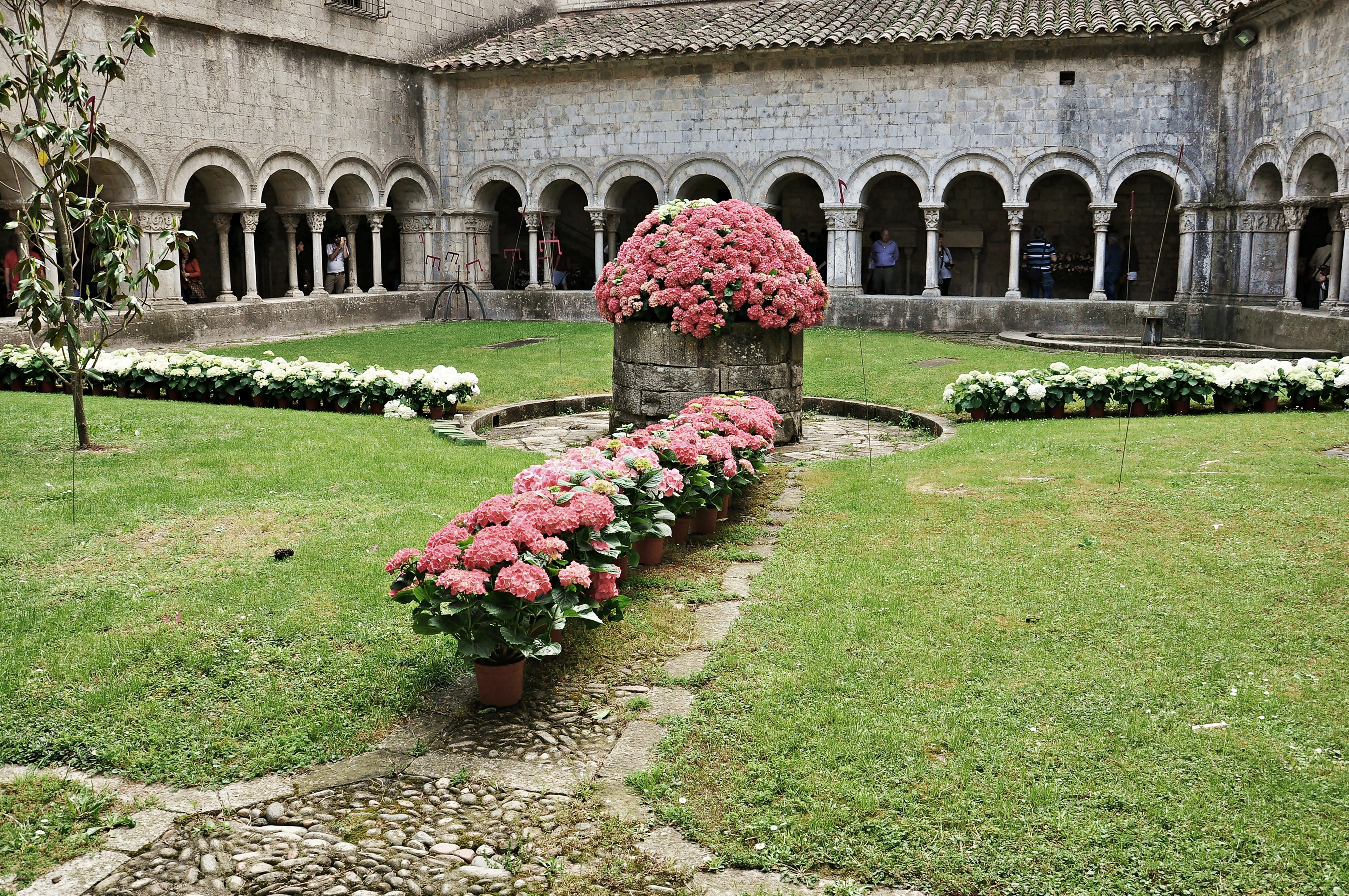 girona-cataluña